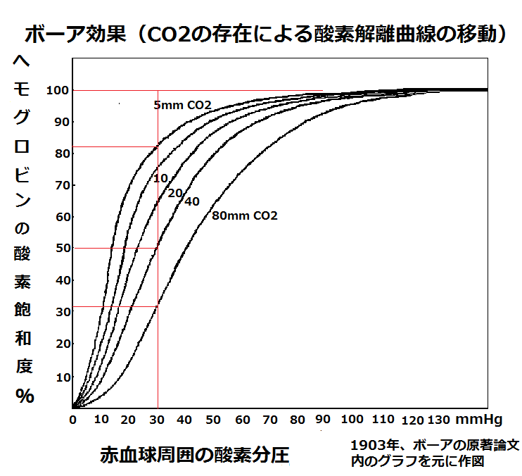 ボーア効果（二酸化炭素の存在による酸素解離曲線の移動） 1903年のボーアの原論文を元に作成